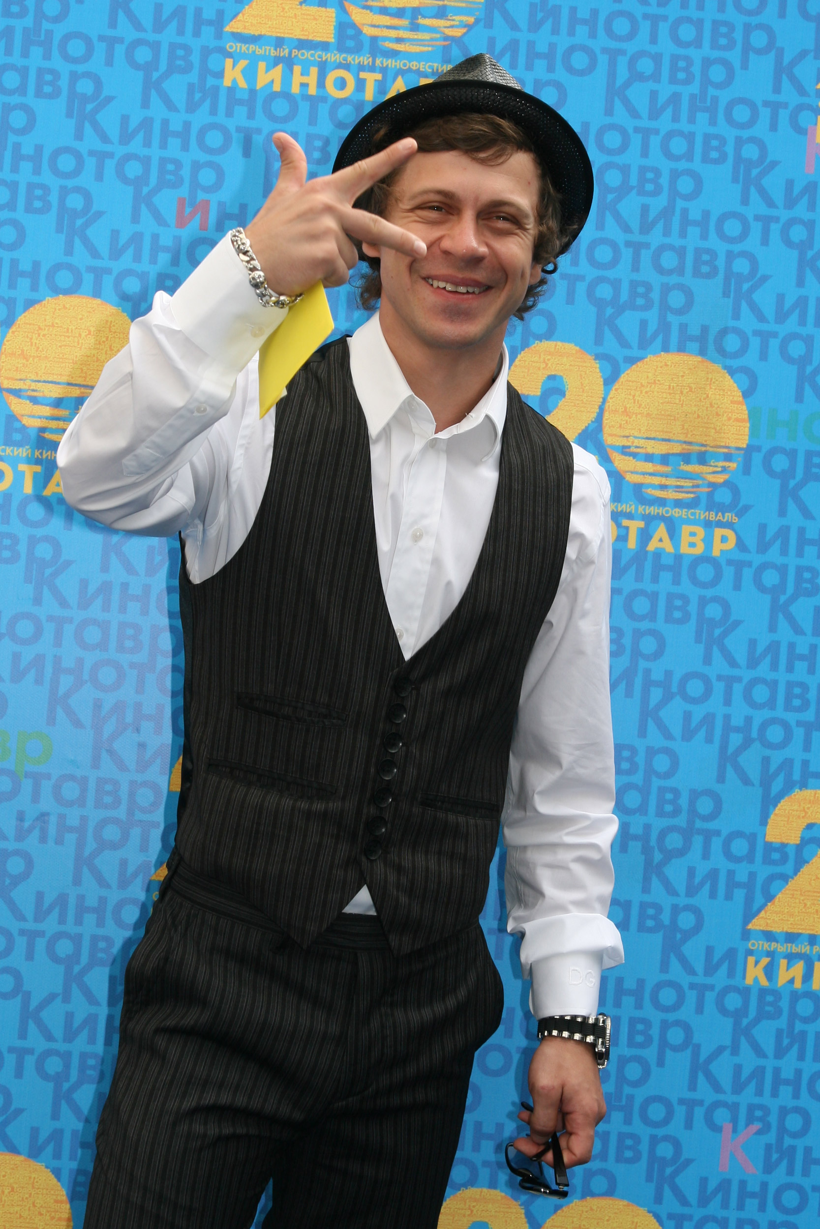 Павел Деревянко на закрытии 20го кинофестиваля Кинотавр